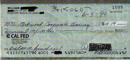 Беларуская (тарашкевіца): Ануляваны пэрсанальны чэк, які выкарыстоўваецца на тэрыторыі ЗША